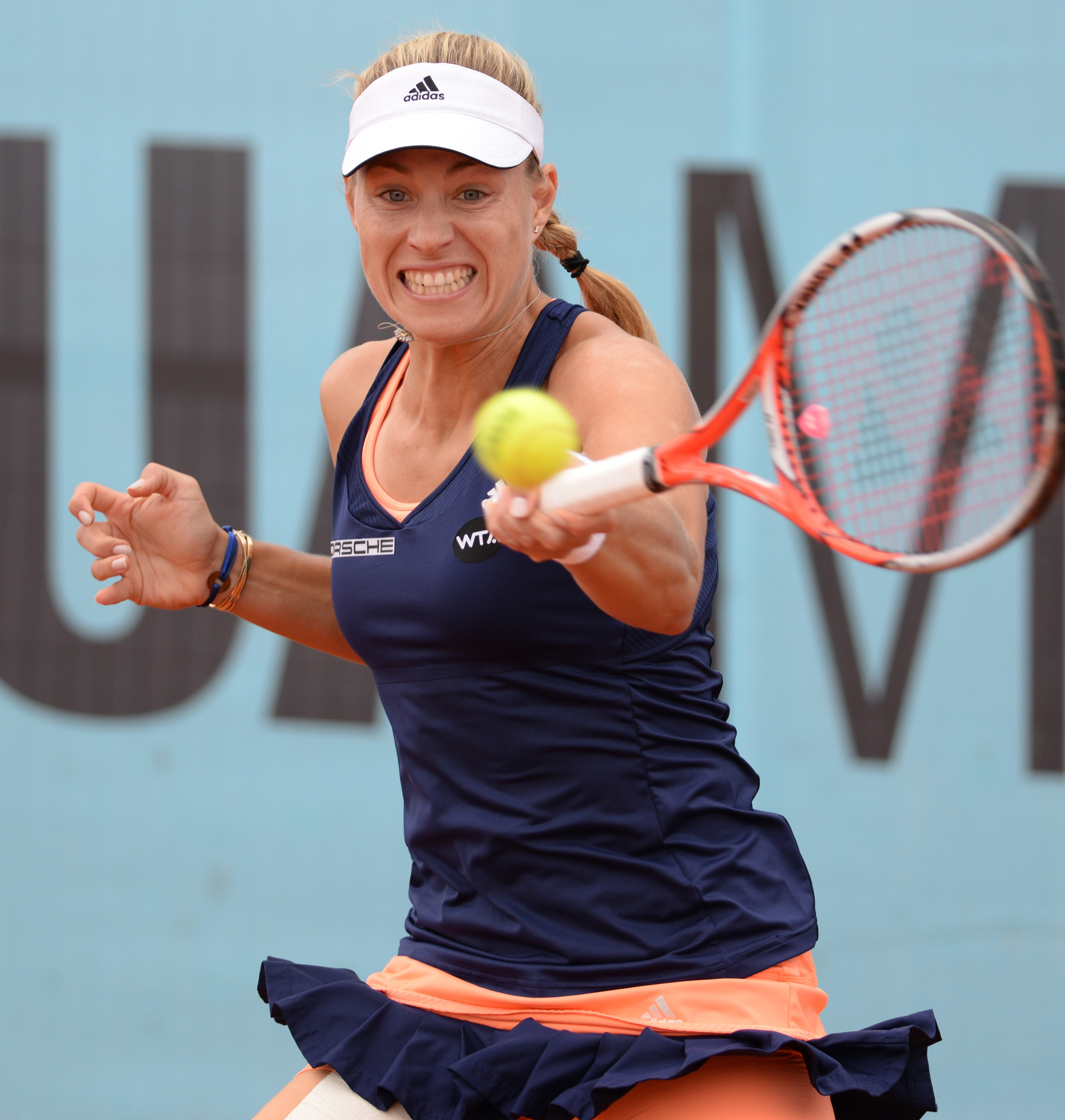 Angelique Kerber